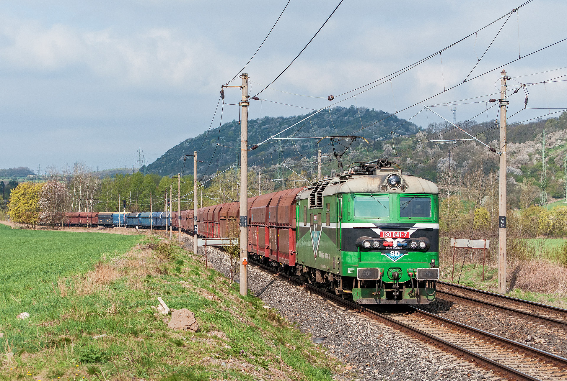 Elektrická lokomotiva 130.041 firmy SD - Kolejová doprava s uhelným vlakem do Elektrárny Mělník u Stadic.